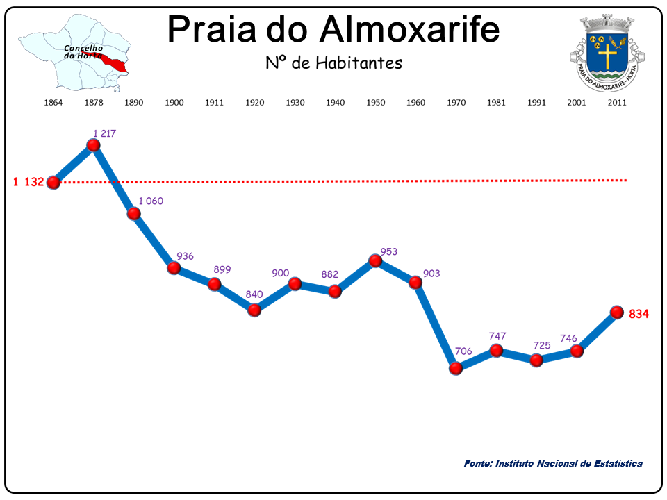 População